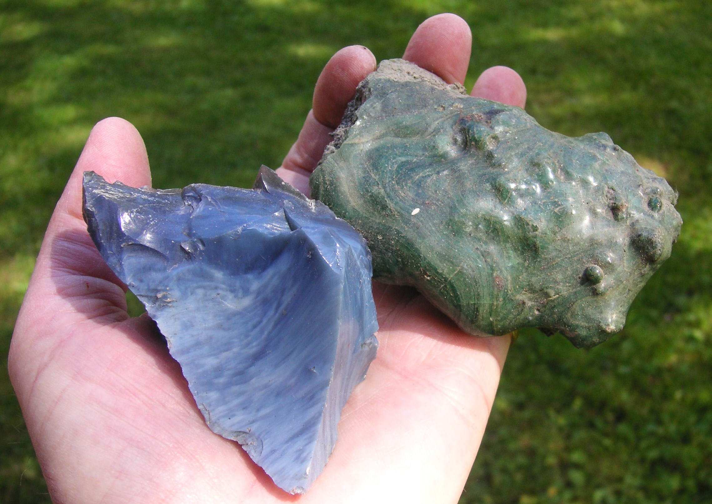 Bergslagssten i blå och grön färg